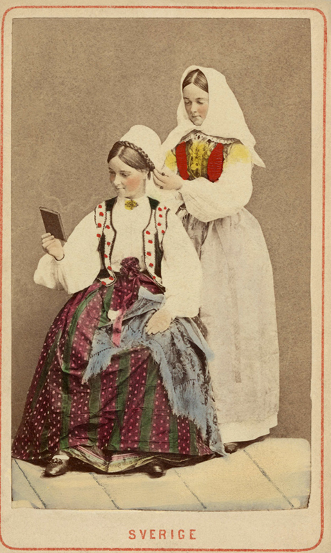 Dräktdockor med huvuden skulpterade av C A Söderman, visade på världsutställningen i Paris 1867. Två kvinnor i folkdräkter från Blekinge, varav en hjälper den andra med huvudbonaden. Handkolorerad version.